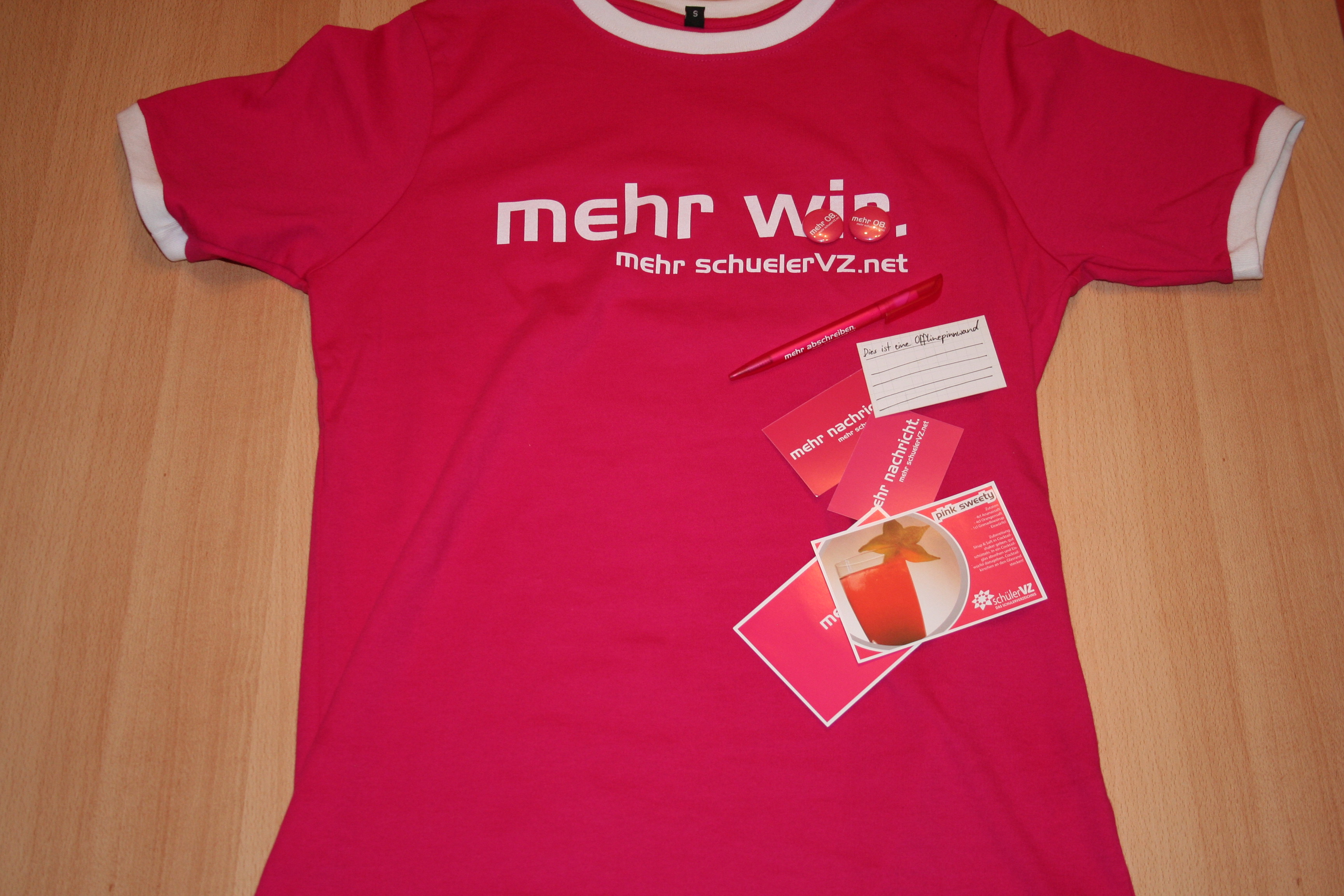 Diverse Marketing-Artikel vom schülerVZ